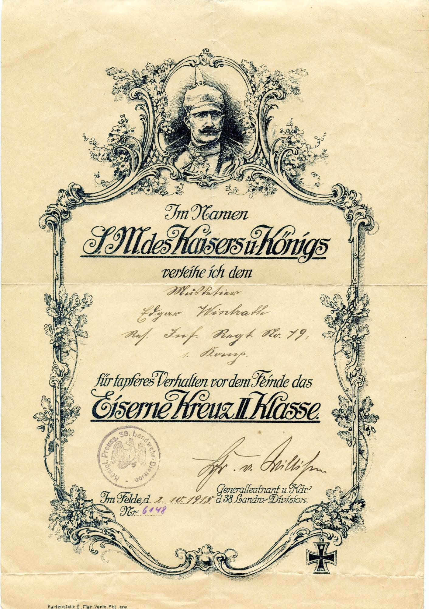 Anstecknadel Eisernes Kreuz, Teile von der Uniform und Urkunde über die Verleihung des Eisernes Kreuzes II. Klasse für Edgar Wintrath, das ihm am 02.10.1918 verliehen wurde. Dienstgrad: Musketier in der Königlich-Preußischen Landwehr-Division, Infanterieregiment 19, 1. Kompanie.